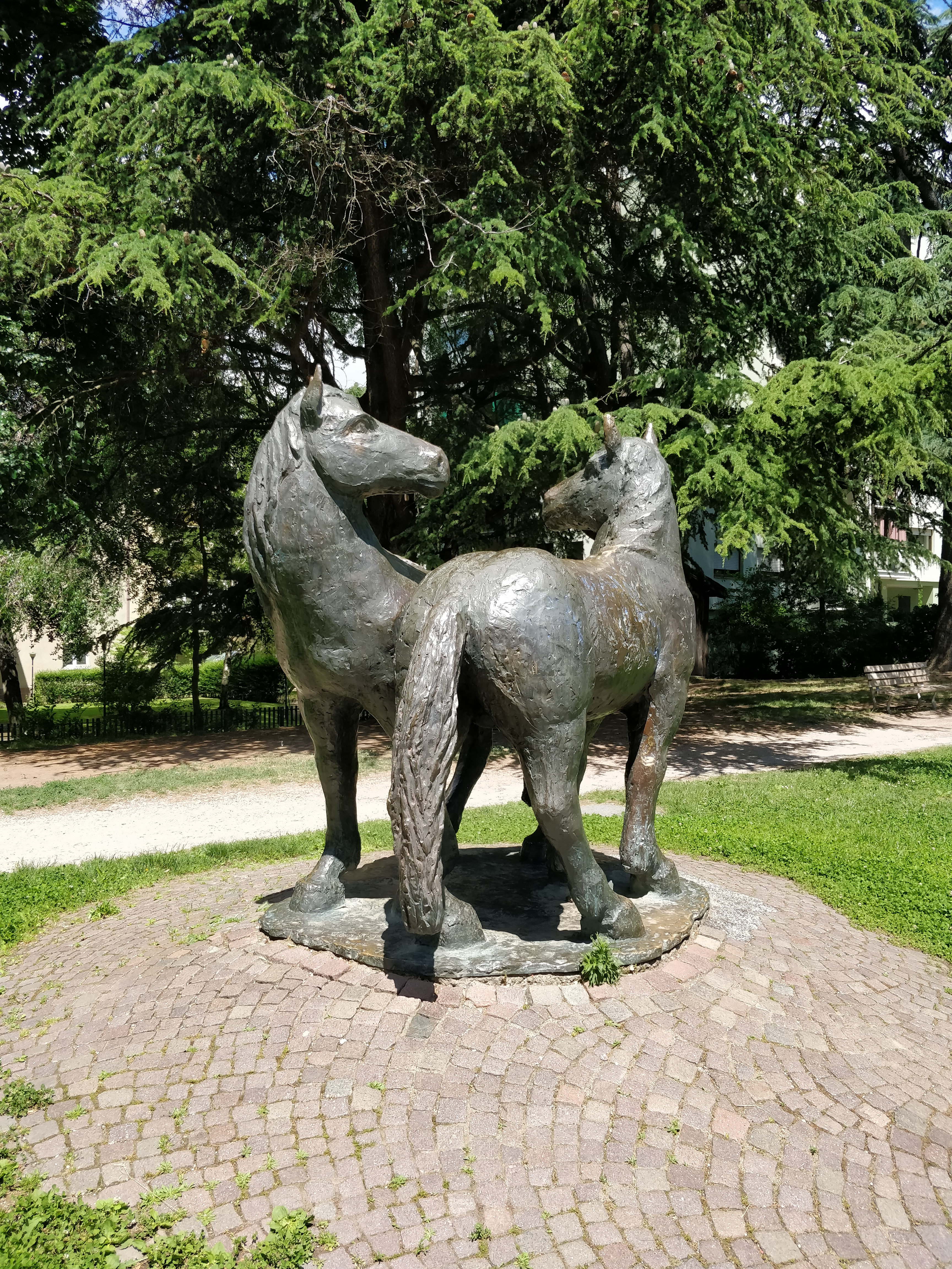 I cavalli bronzei di Hans Plangger lungo la Passeggiata Lungo Isarco Destro a Bolzano